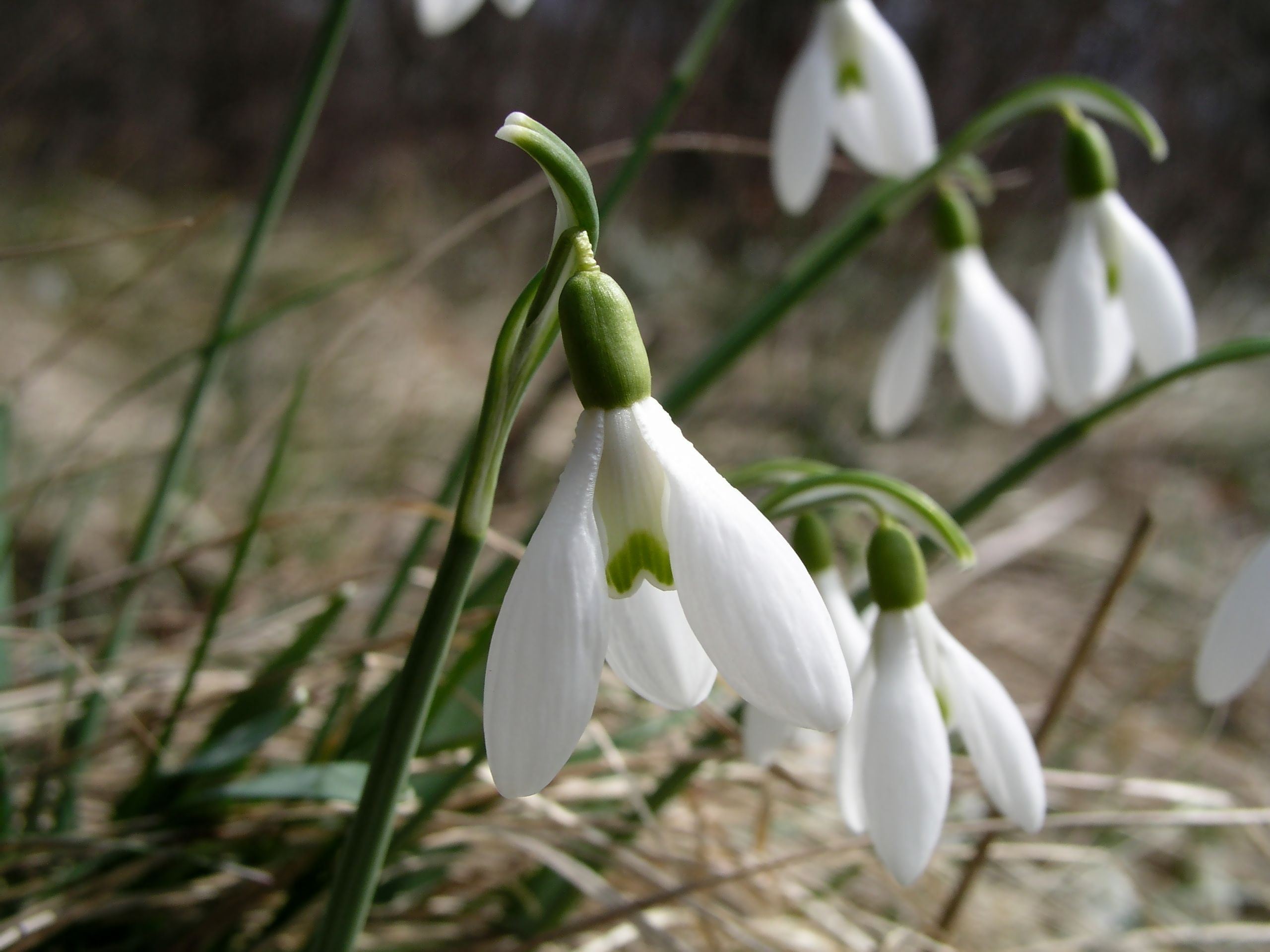 Snowdrop